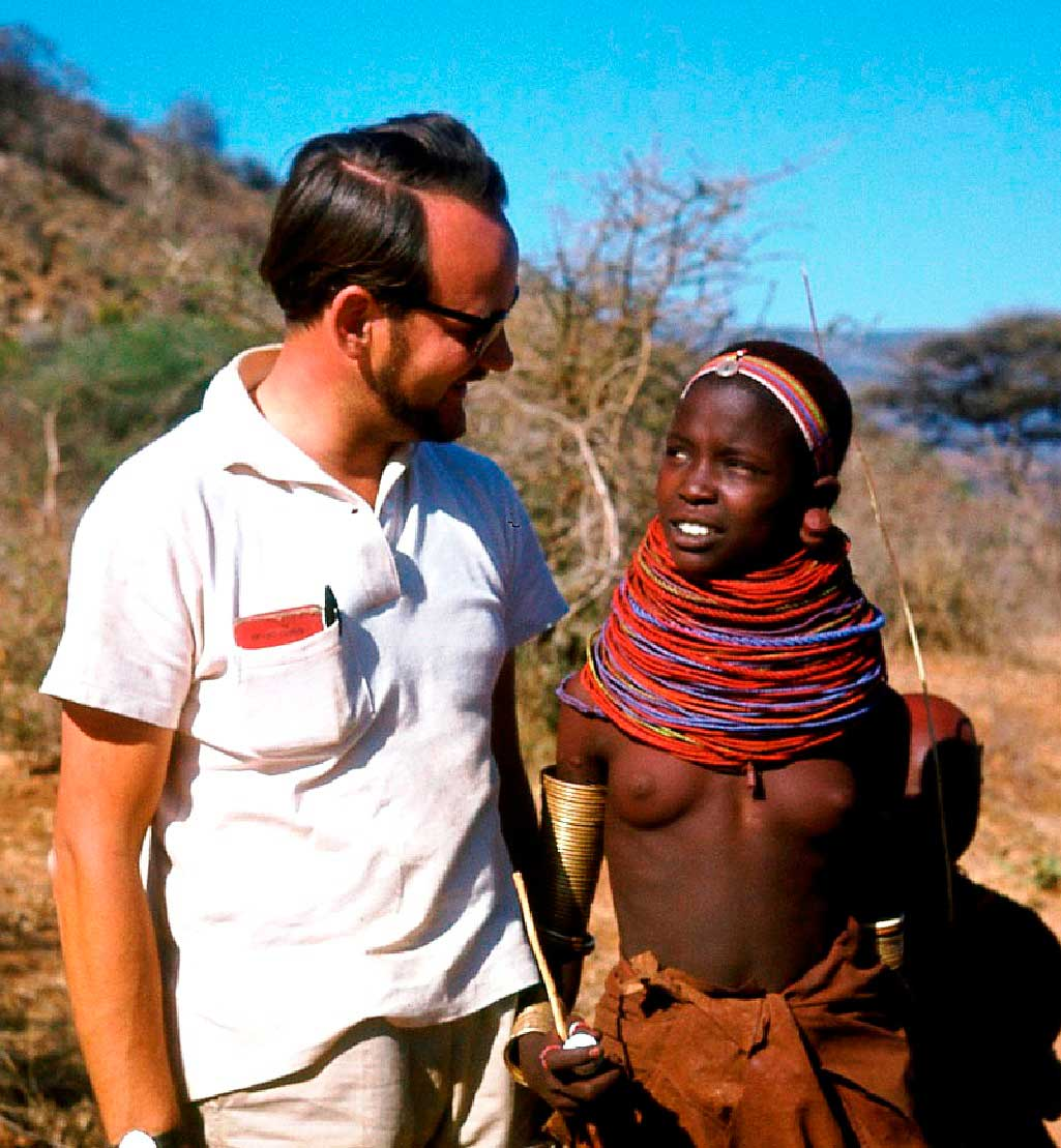 КЕНИЯ. Район Маралал. Я с девушкой народности самбуру. Отделившись в 1600-х годах от масаев, самбуру до наших дней сохранили свои традиции минувших веков.